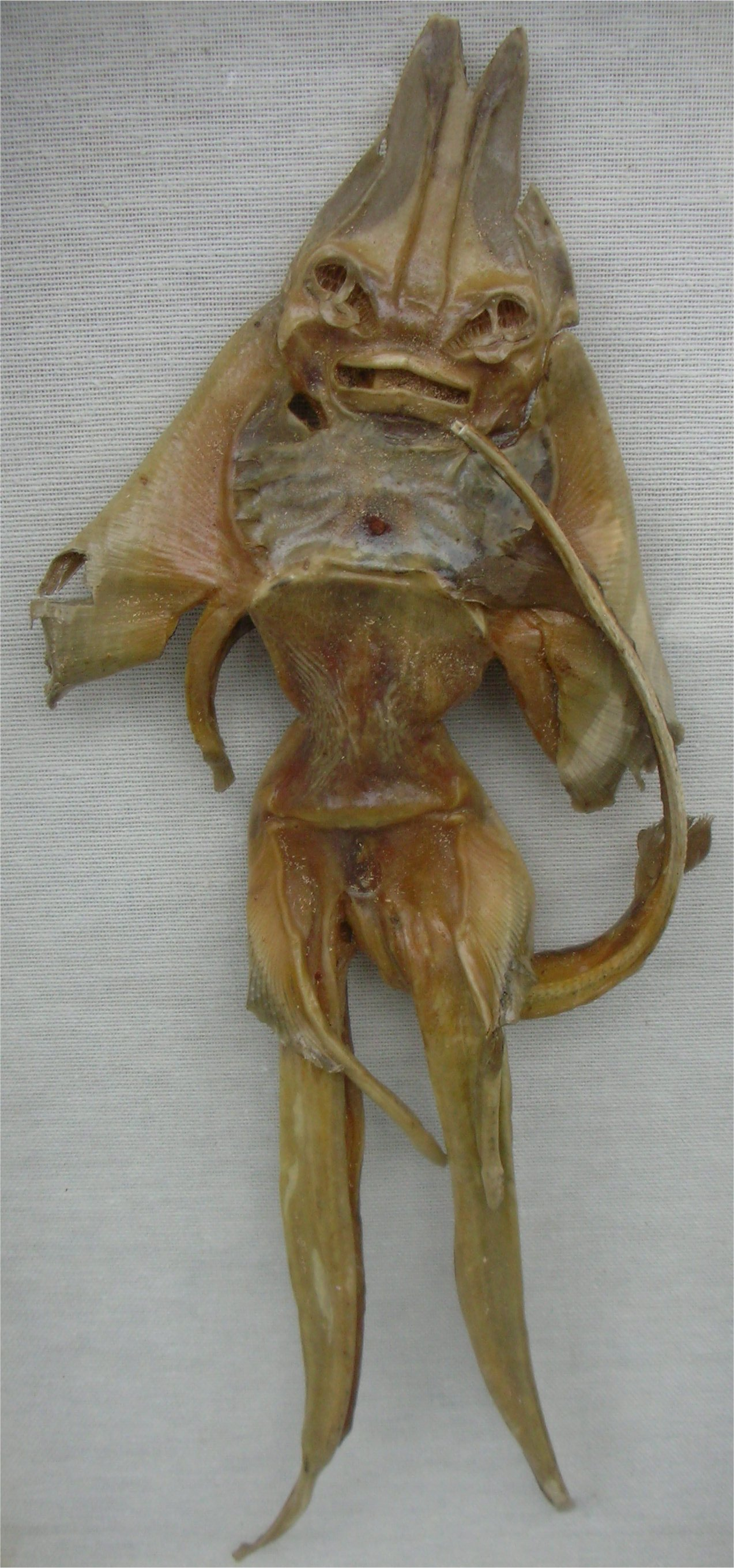 Jenny Haniver, Devil fish